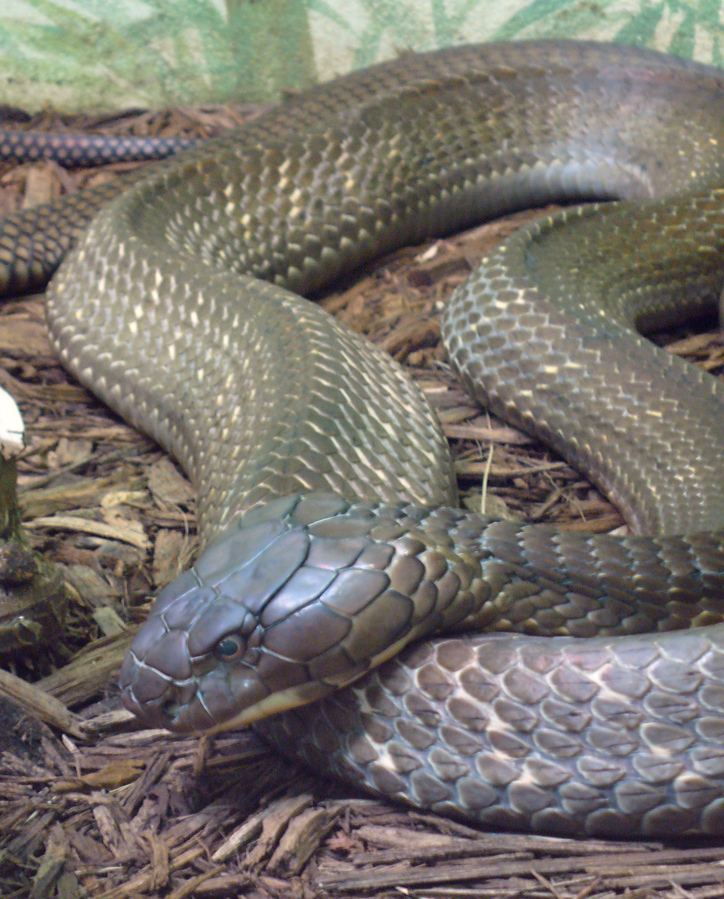 King cobra (Ophiophagus hannah)